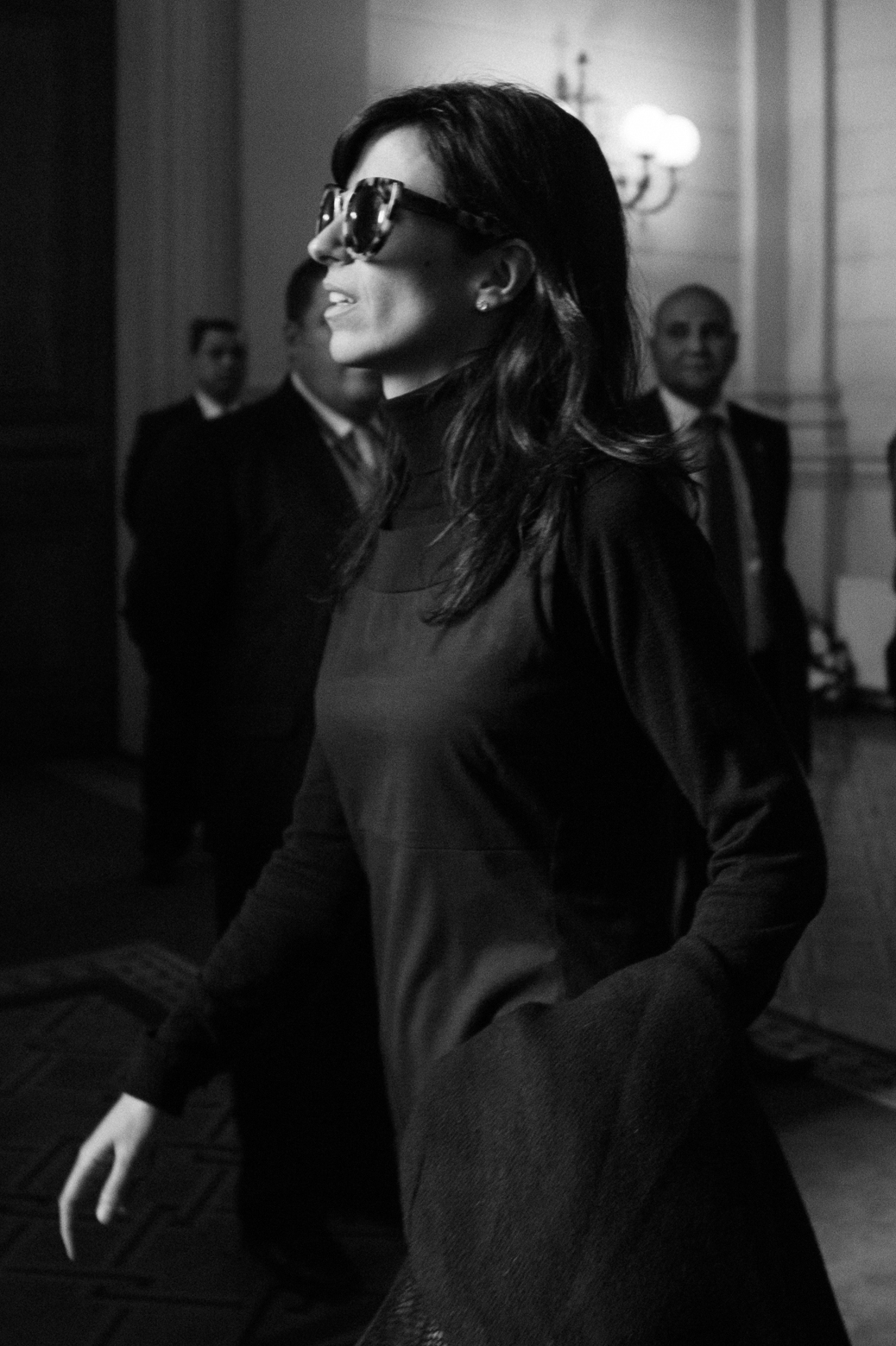 12 Funeral de Estado de Patricio Aylwin.